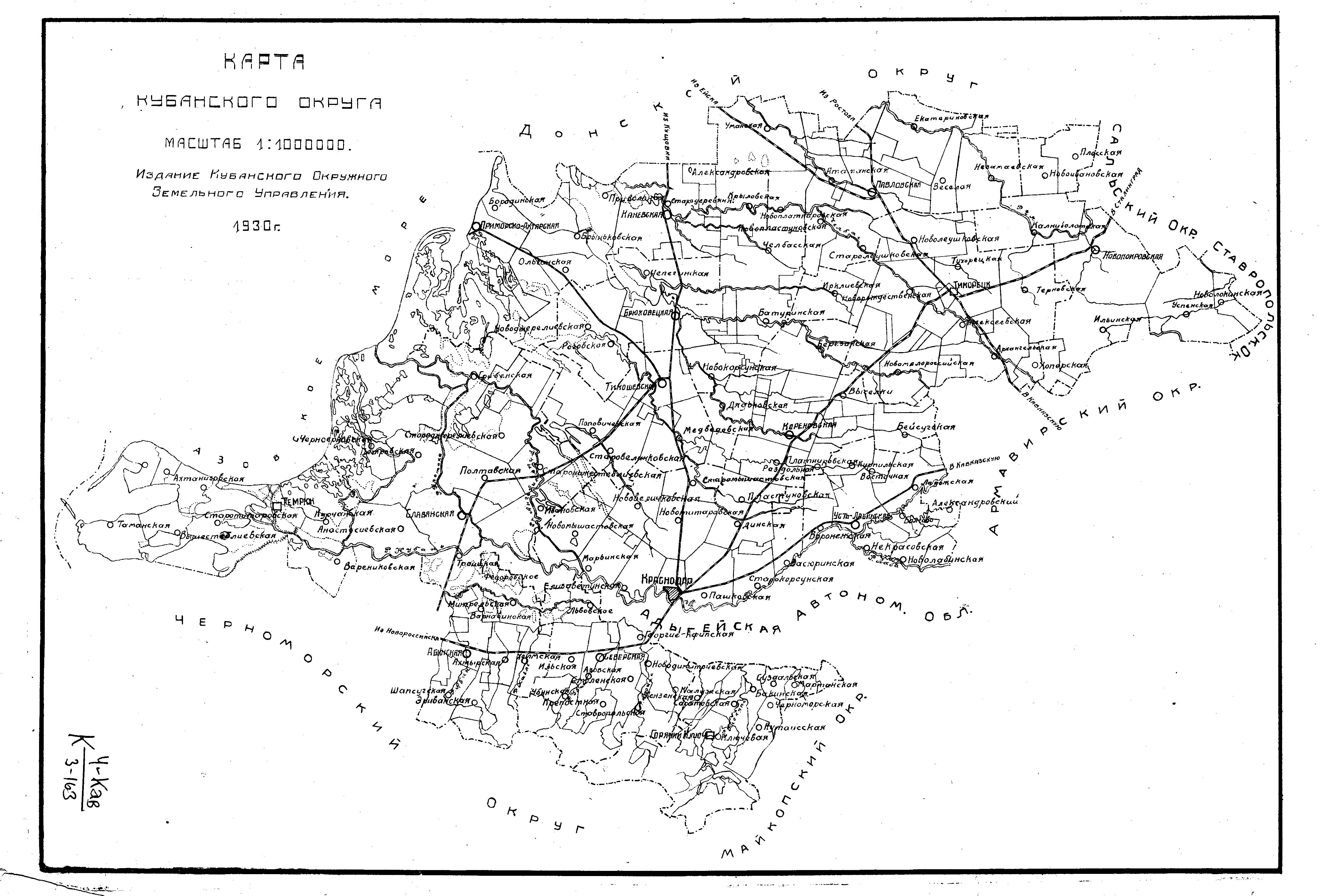 Карта Кубанского округа, 1930 г.